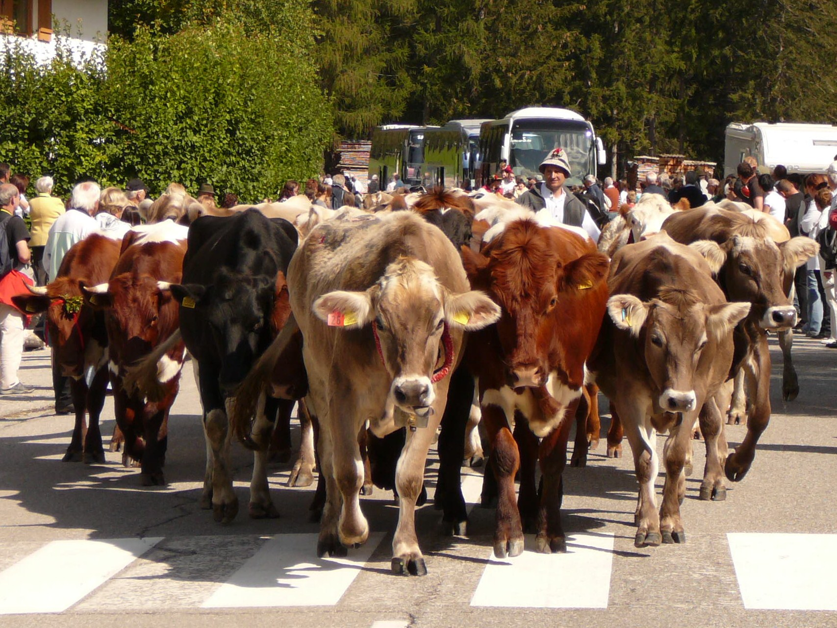 Almabtrieb in Wahlen bei Toblach